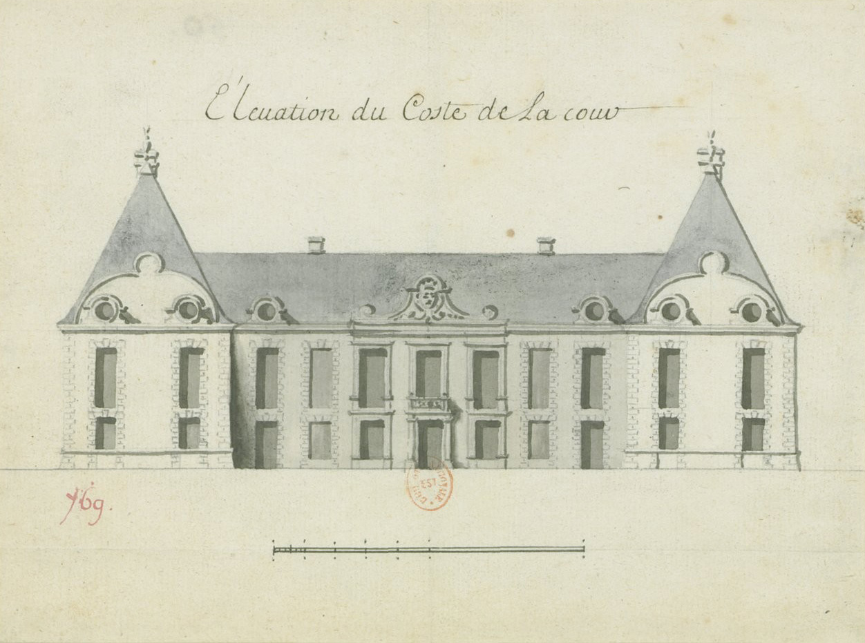 Zeichnung der Hoffassade des Schlosses Médavy